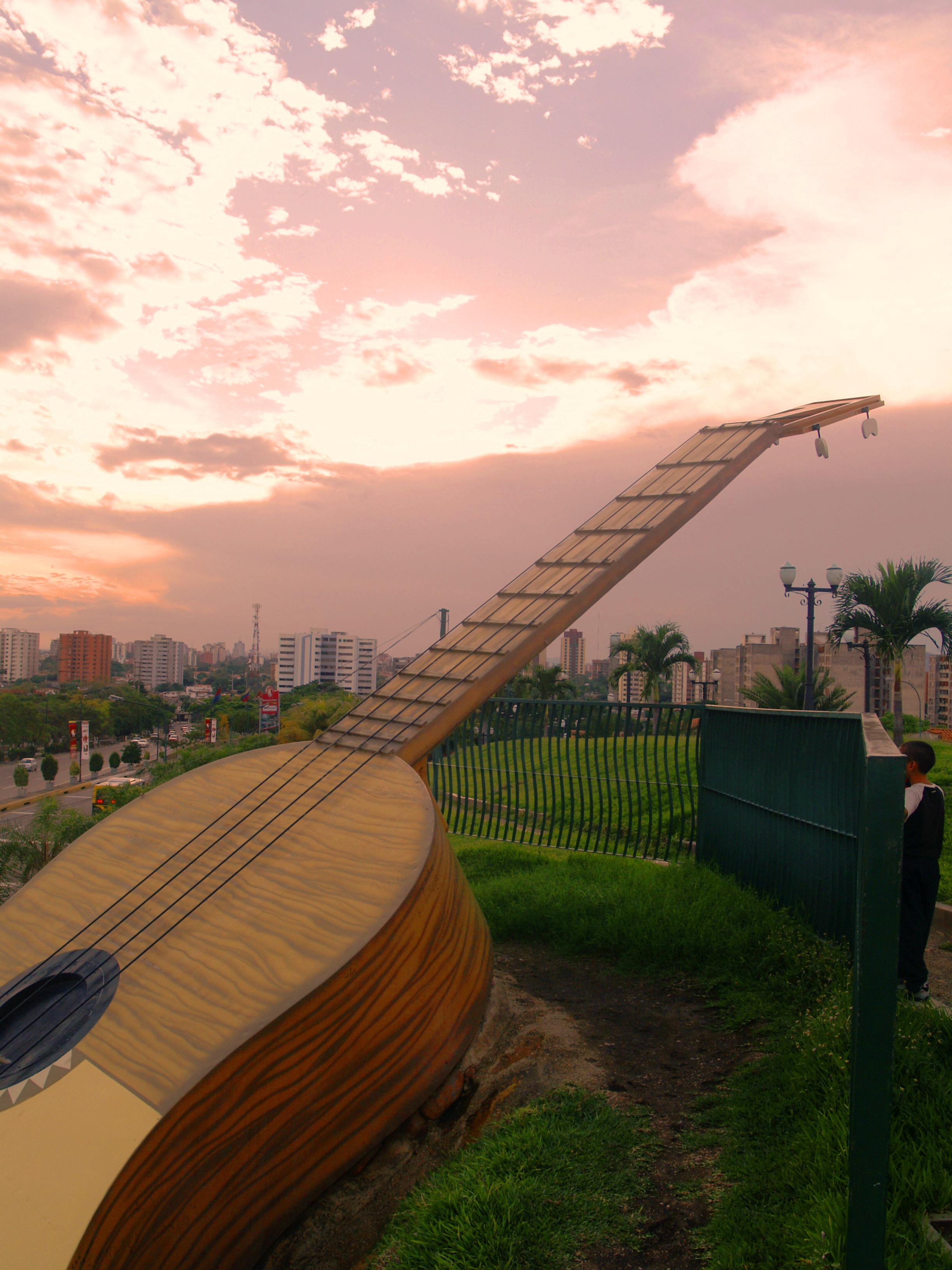 El dichoso Cuatro colorido, Barquisimeto.